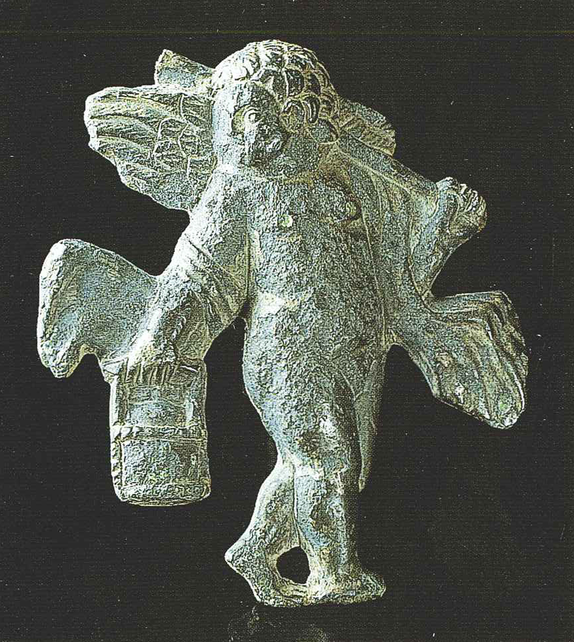 Römischer Bronzebeschlag in Form eines Amors aus Hellerhausen bei Wüsten, Bad Salzuflen.Gefunden von Leo Nebelsiek, 1935; H = 7,8 cm; B = 6,7 cm; D = 1,0 cm